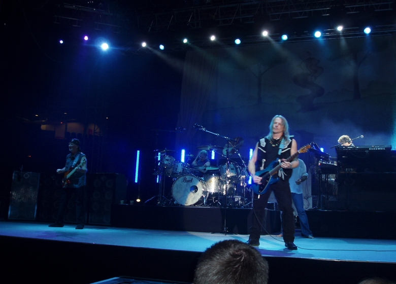 Obrázok som odfotil počas koncertu Deep Purple 7.10.2006 v Košiciach